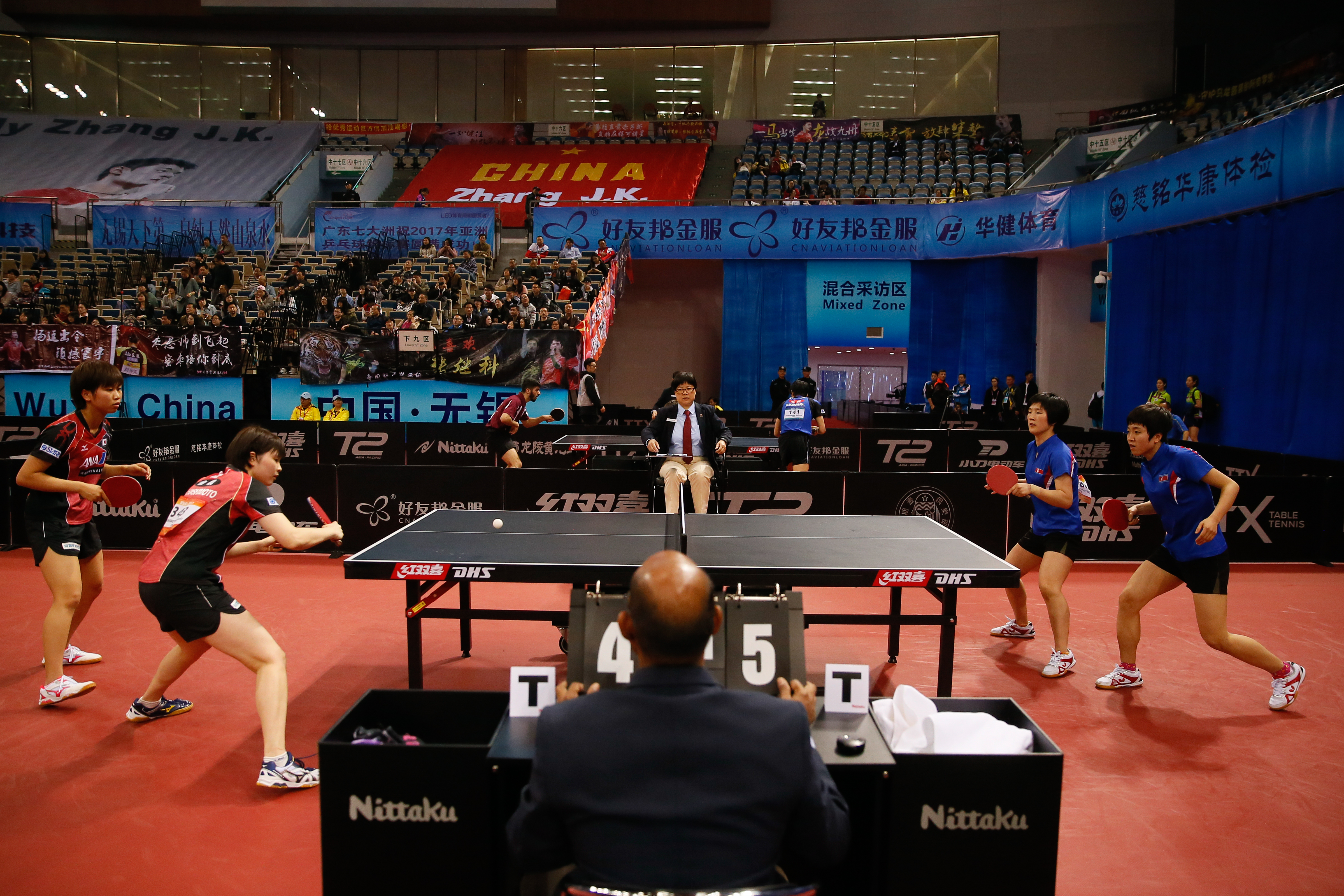 _K0K7099